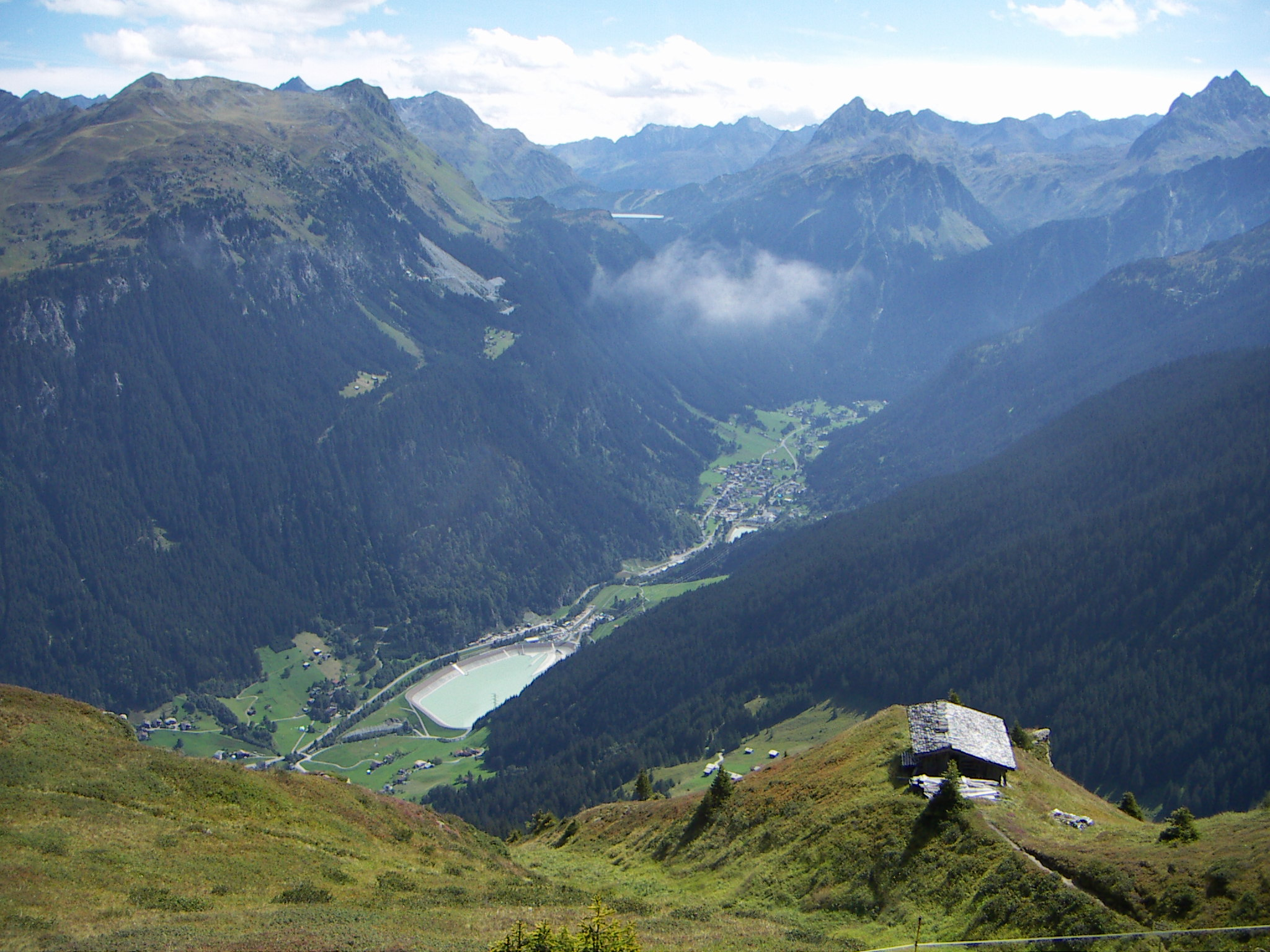 Ortsteil Partenen, Gaschurn, Vorarlberg, ÖsterreichVon der Versettlabahn über das Ausgleichsbecken Rifa des Rifawerks taleinwärts, über dem Ort glänzt der Kopssee, rechts die Vallüla, links Augstenberg/Versalspitze